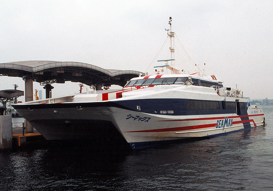 石崎汽船 松山観光港－門司港間高速艇 シーマックス